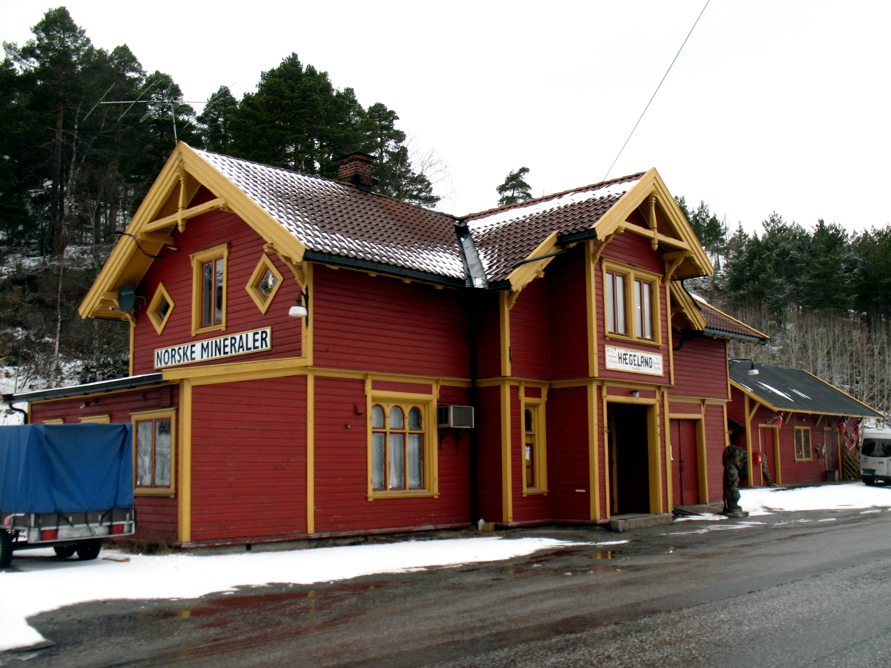 Den tidligere stasjonsbygningen for Setesdalsbanen i Hægeland er i 2013 stensenter